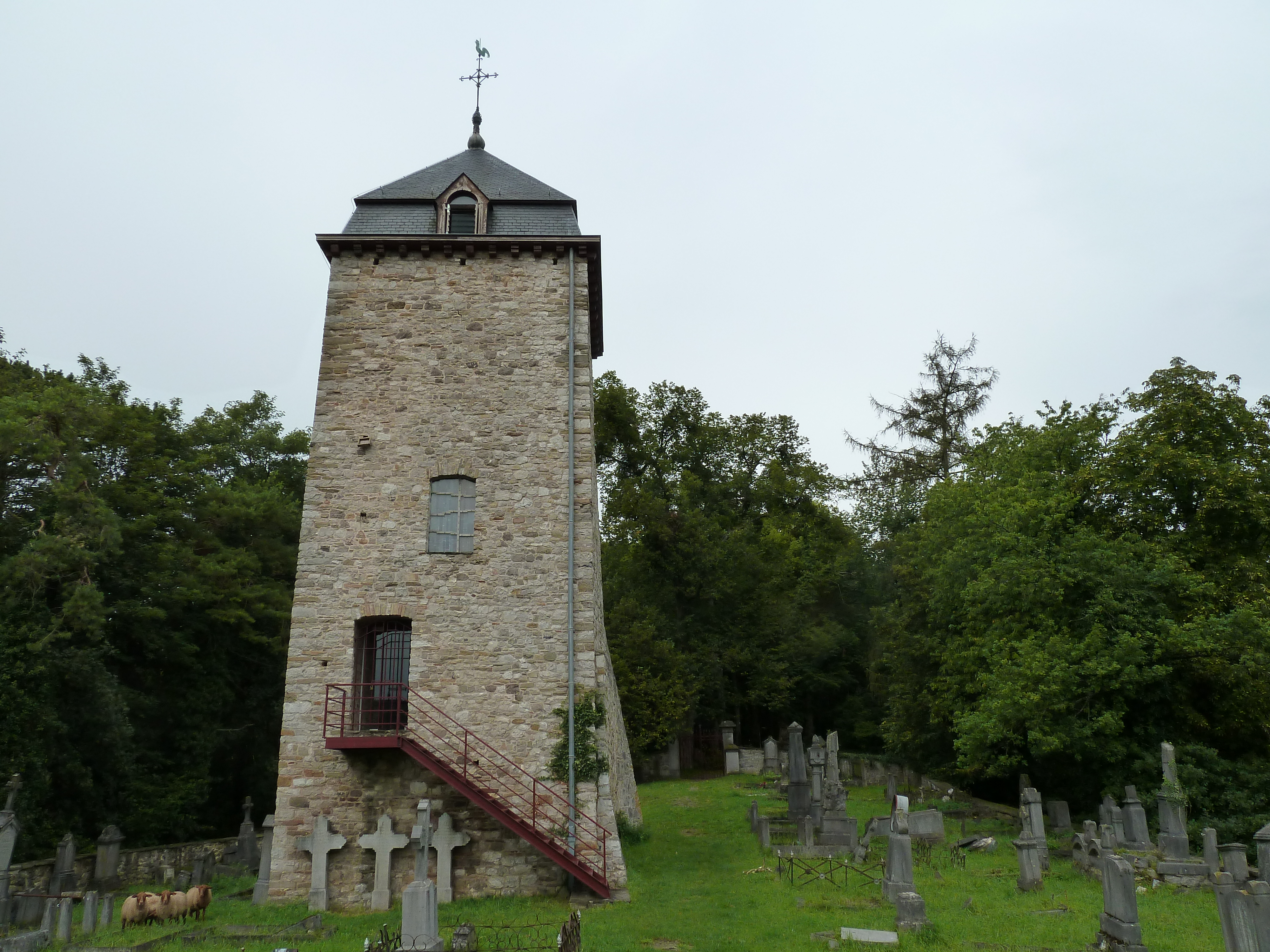 tour de l'ancienne église Saint-Martin, Comblain-au-Pont, Belgique